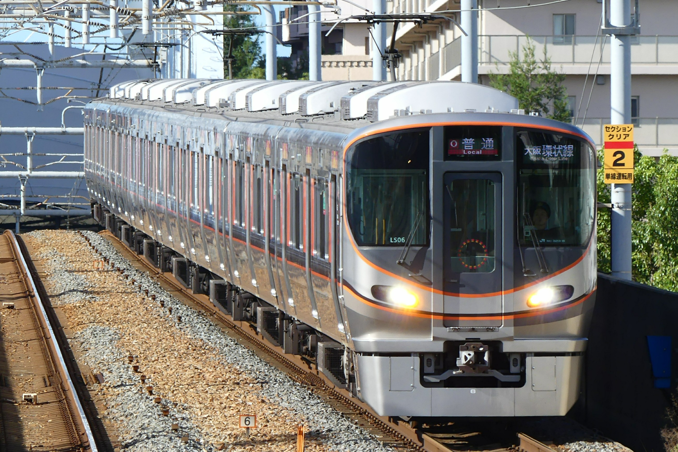 大阪環状線・桜島線323系電車